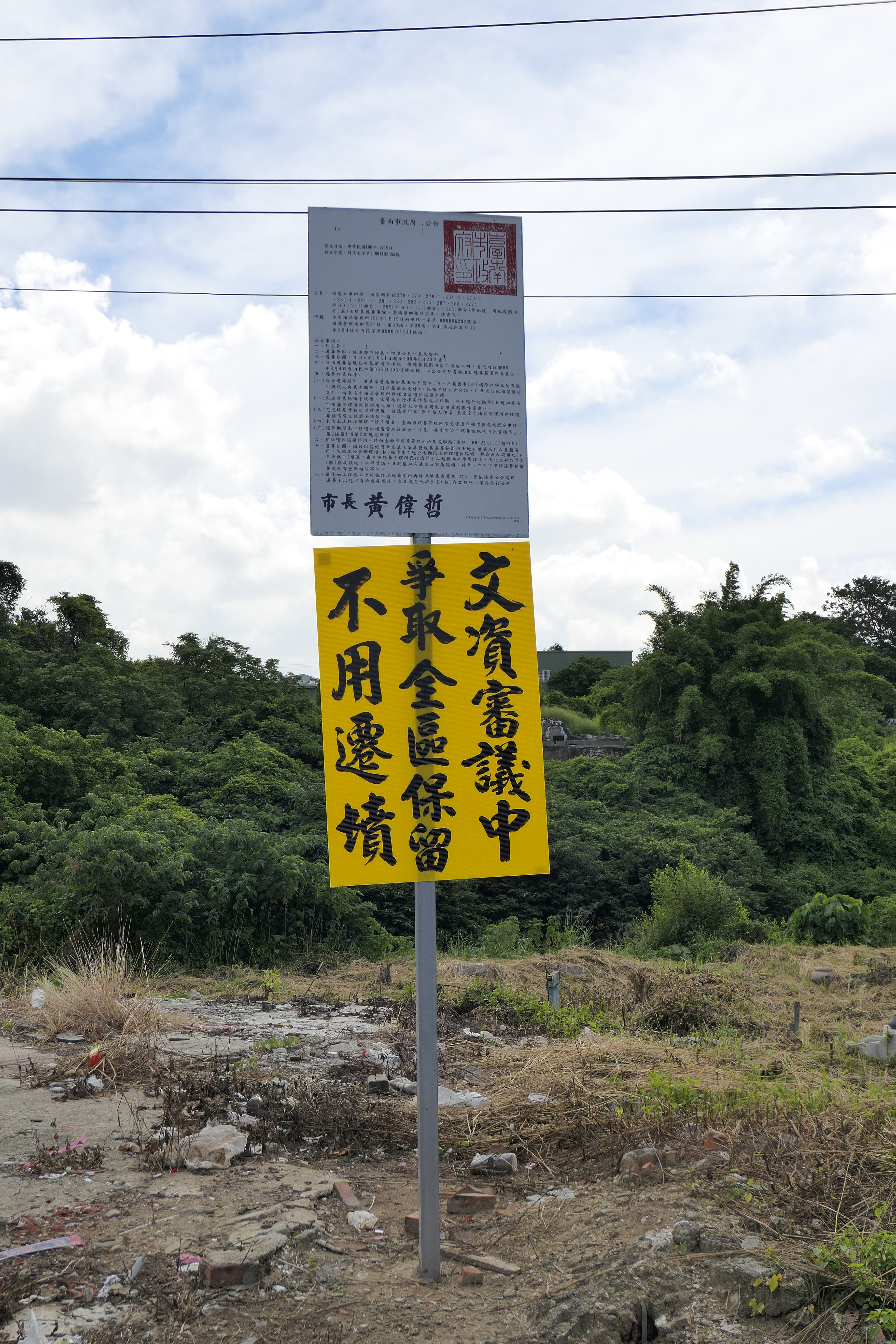 立在南山公墓的告示牌。上面是臺南市政府有關遷葬的公文，下面是反對南山公墓遷葬的團體所弄的告示。